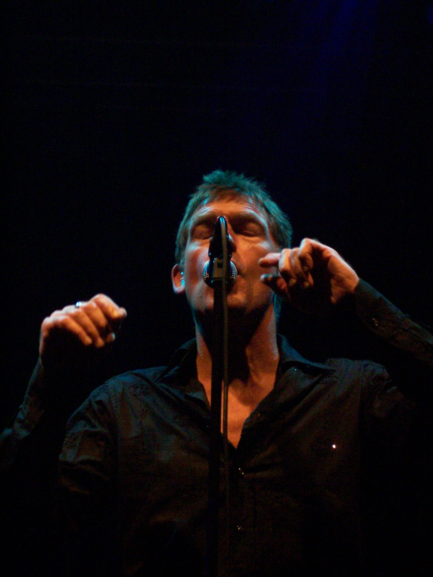 Huub van der Lubbe tijdens een concert van De Dijk